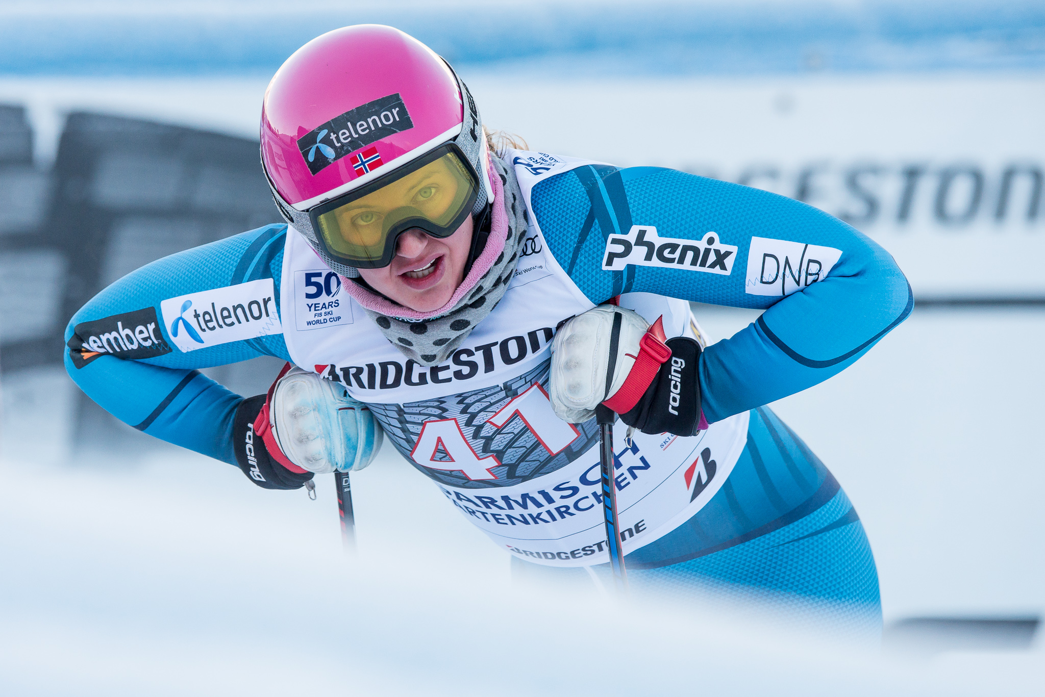 64. Kandahar Rennen,Audi FIS Ski Weltcup Garmisch-Partenkirchen,Damen Abfahrt,Kandahar,Ladies Downhill,Maria Therese Tviberg